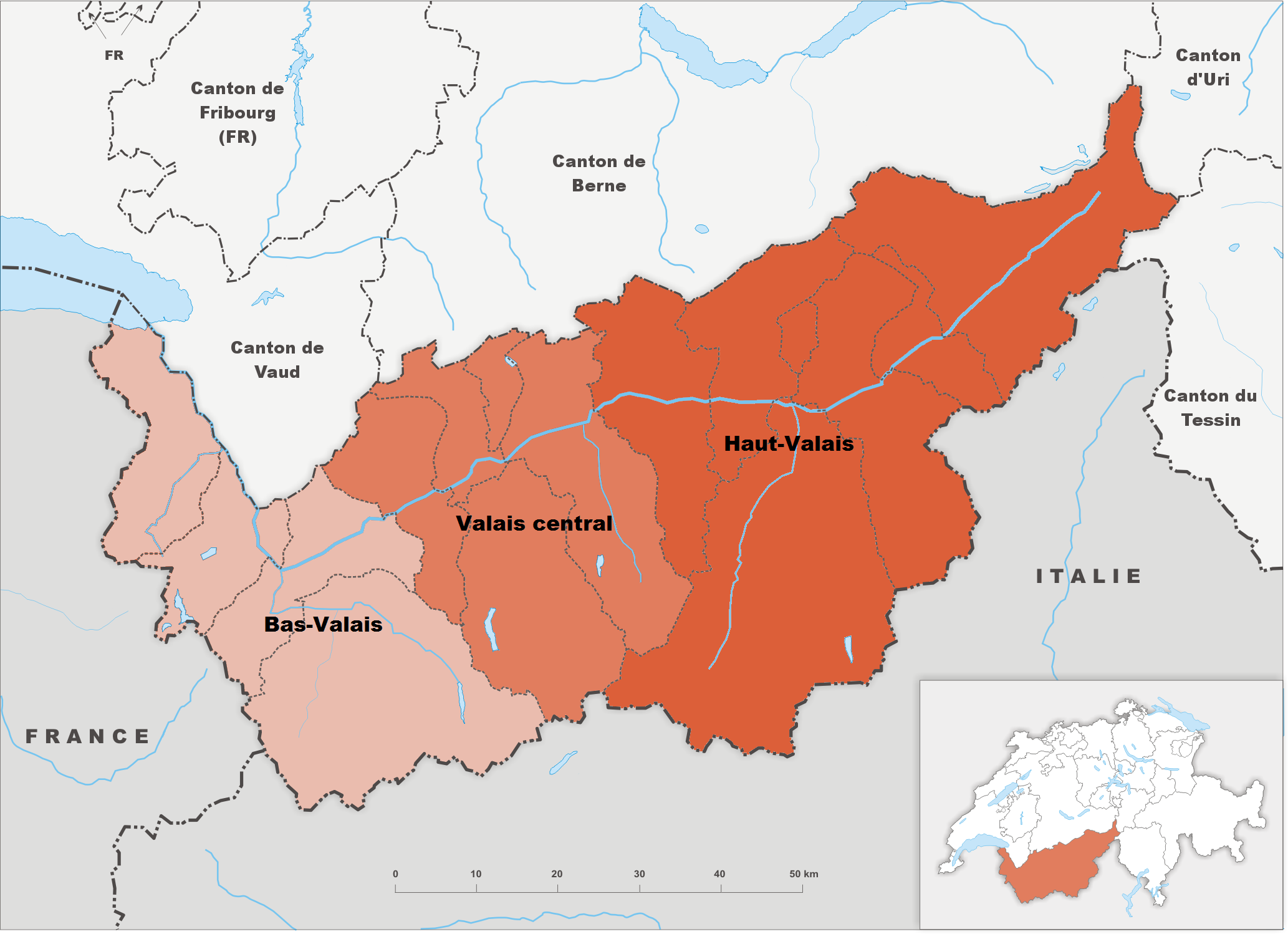 Carte des trois régions du Valais